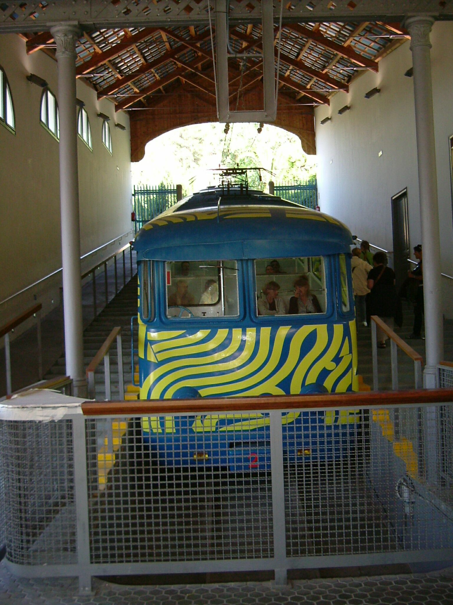 Tibidabo Funicular, Barcelona, Spain